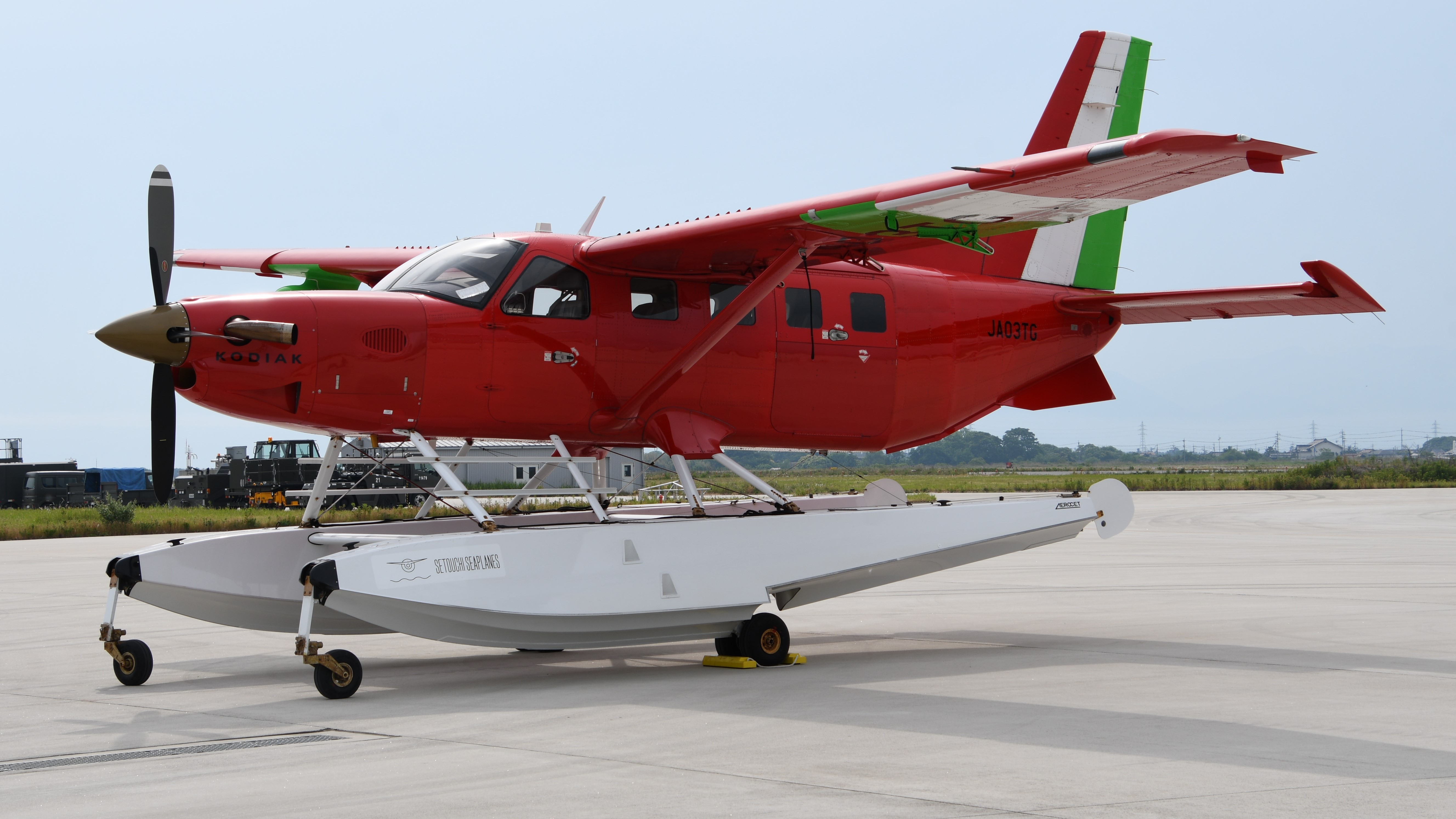 せとうちSEAPLANES クエスト・コディアック100水陸両用機（JA03TG、”ラーラ ロッサ”） 左前面。2019年6月2日 航空自衛隊美保基地にて。